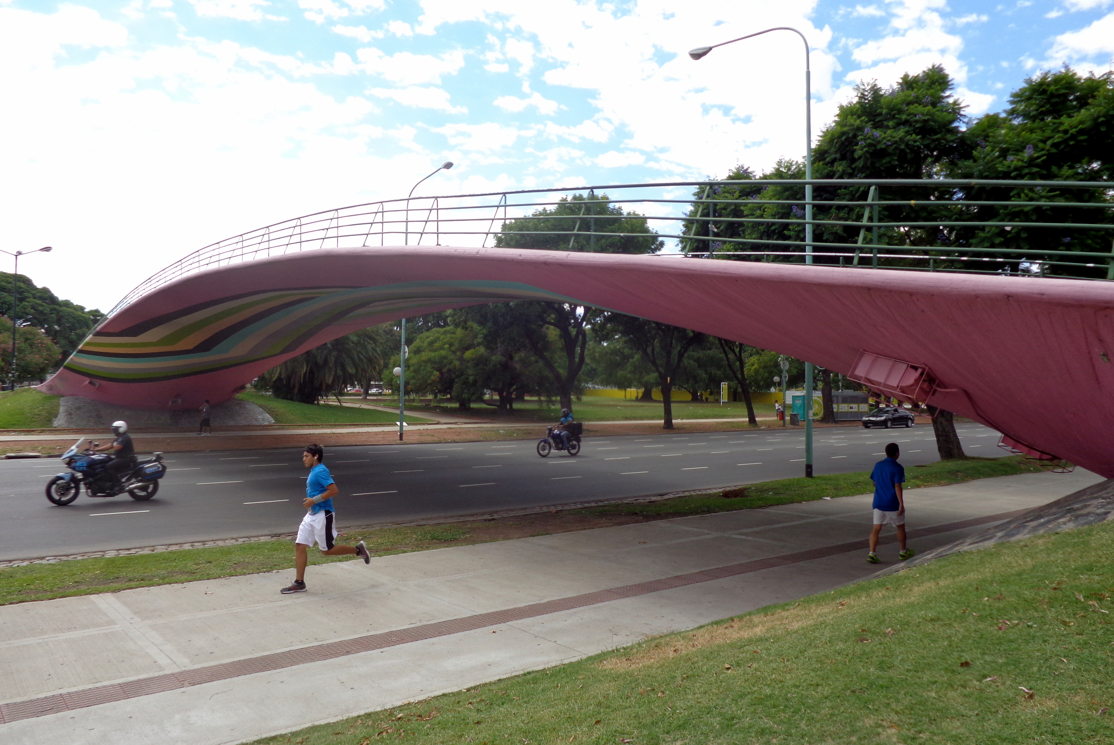 Puente que une la Plaza Rubén Darío (donde se encuentra el Museo de Bellas Artes) con la Plaza República Federativa de Brasil (frente a la Facultad de Abogacía de la UBA), sobre la Avenida Figueroa Alcorta. En Recoleta, Buenos Aires, Argentina.